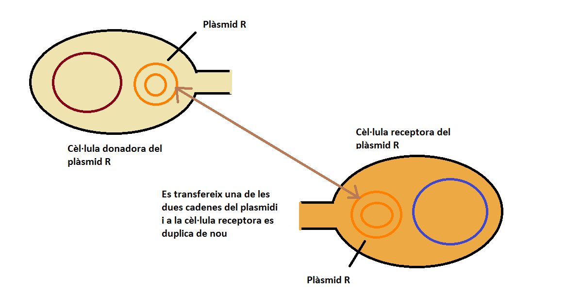 FOTO CONJUGACIÓ